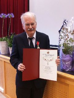 Øistein Kristensen mottok Ridder av St. Olavs orden 1. klasse, 19. juni 2013